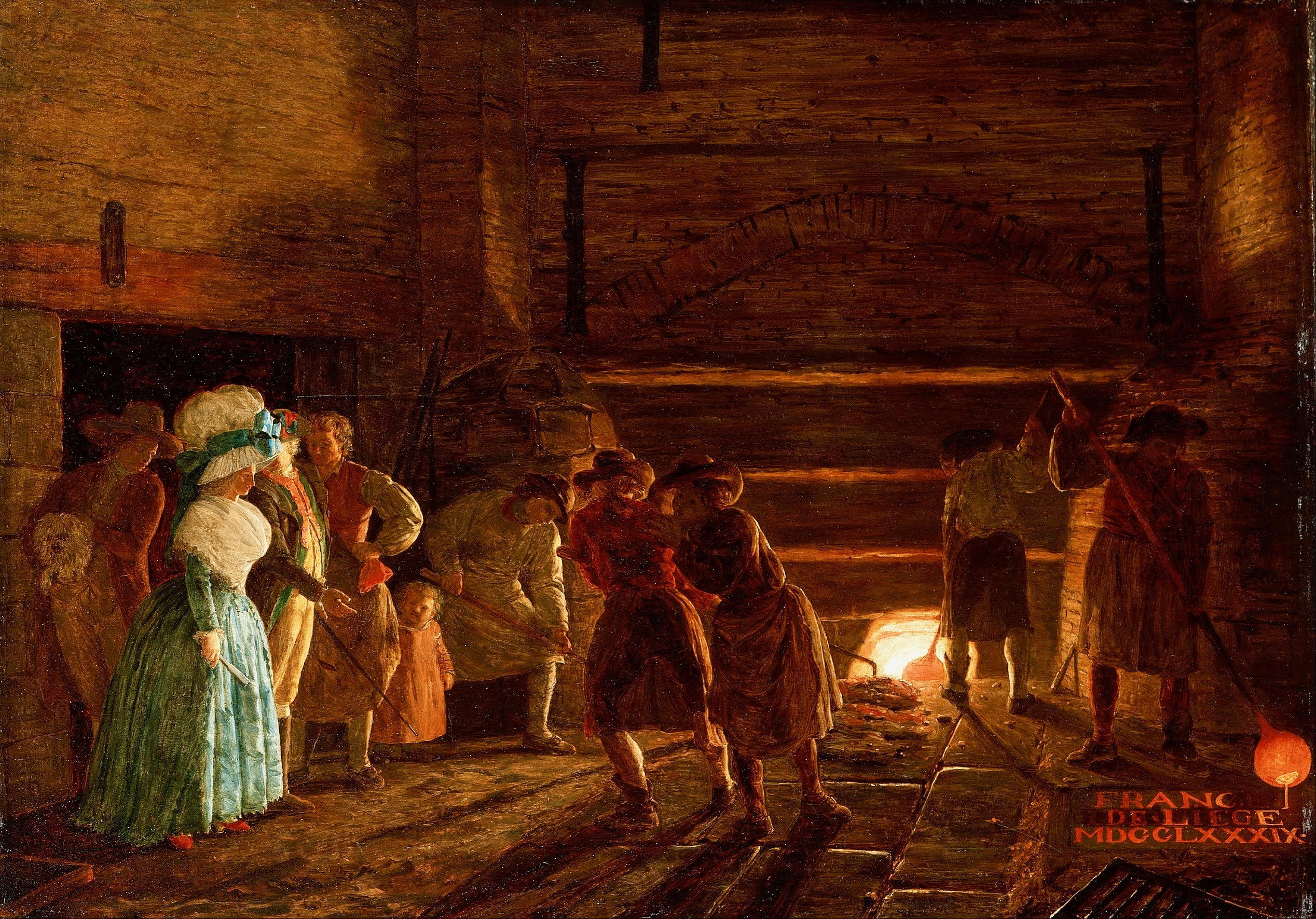 Léonard Defrance (1735–1805): Inneres einer Gießerei. Öl auf Holz, 41,9 x 59,1 cm. Walker Art Gallery, Liverpool.